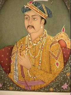 Akbar